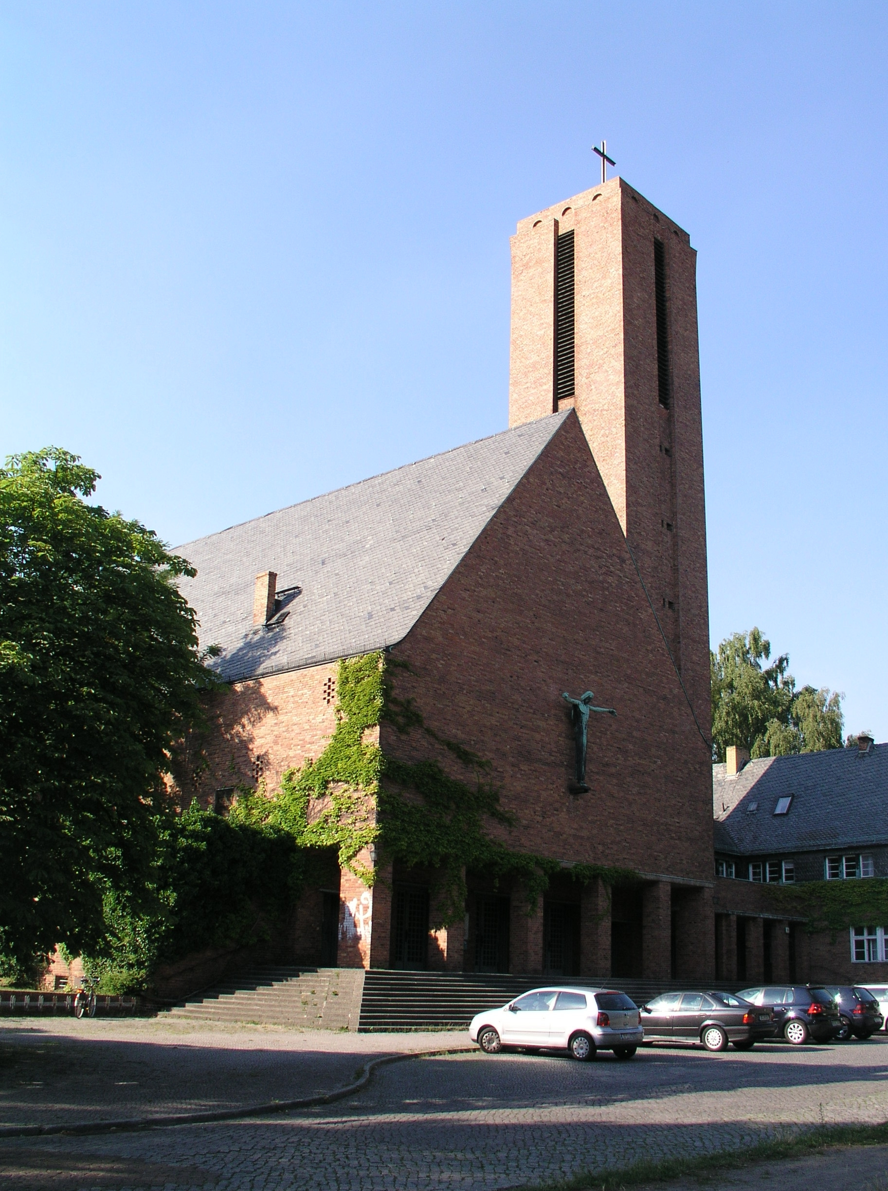 Gesamtansicht (3)